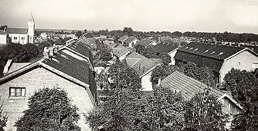 Đurđenovac u prvoj polovici 20. stoljeća